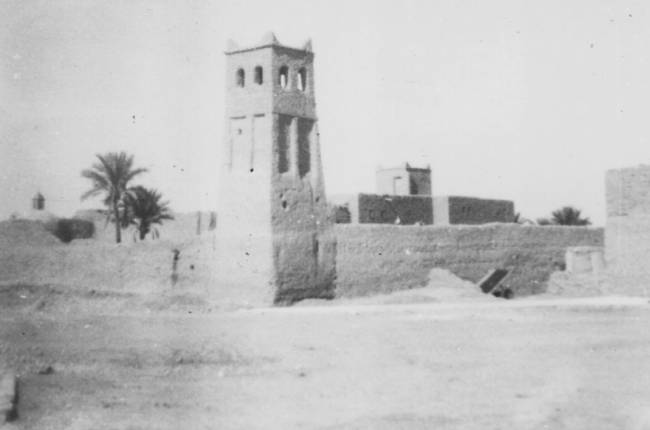 صورة لقرية سيدي عقبة في يوم الأحد 15 أبريل 1962 التقطها جان بيير ليري، جندي فرنسي بالجزائر